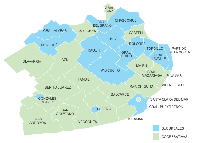 Área de concesión del servicio de electricidad a la empresa EDEA (Argentina)